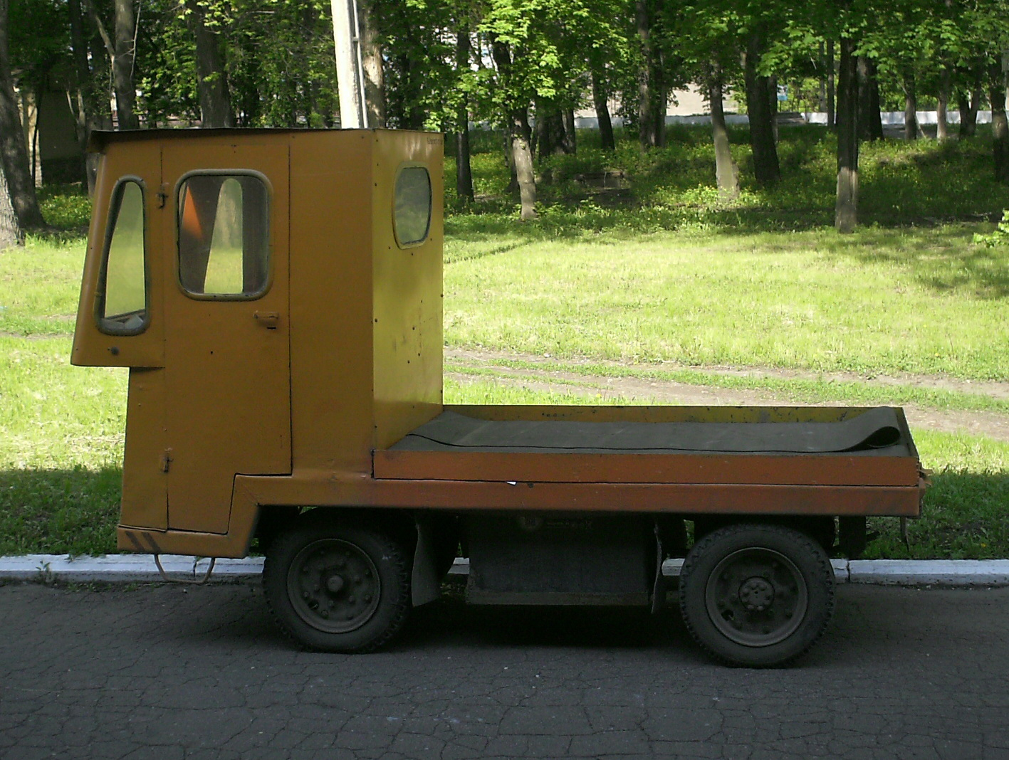 електрокар на території НКМЗ: електрокар на території НКМЗ